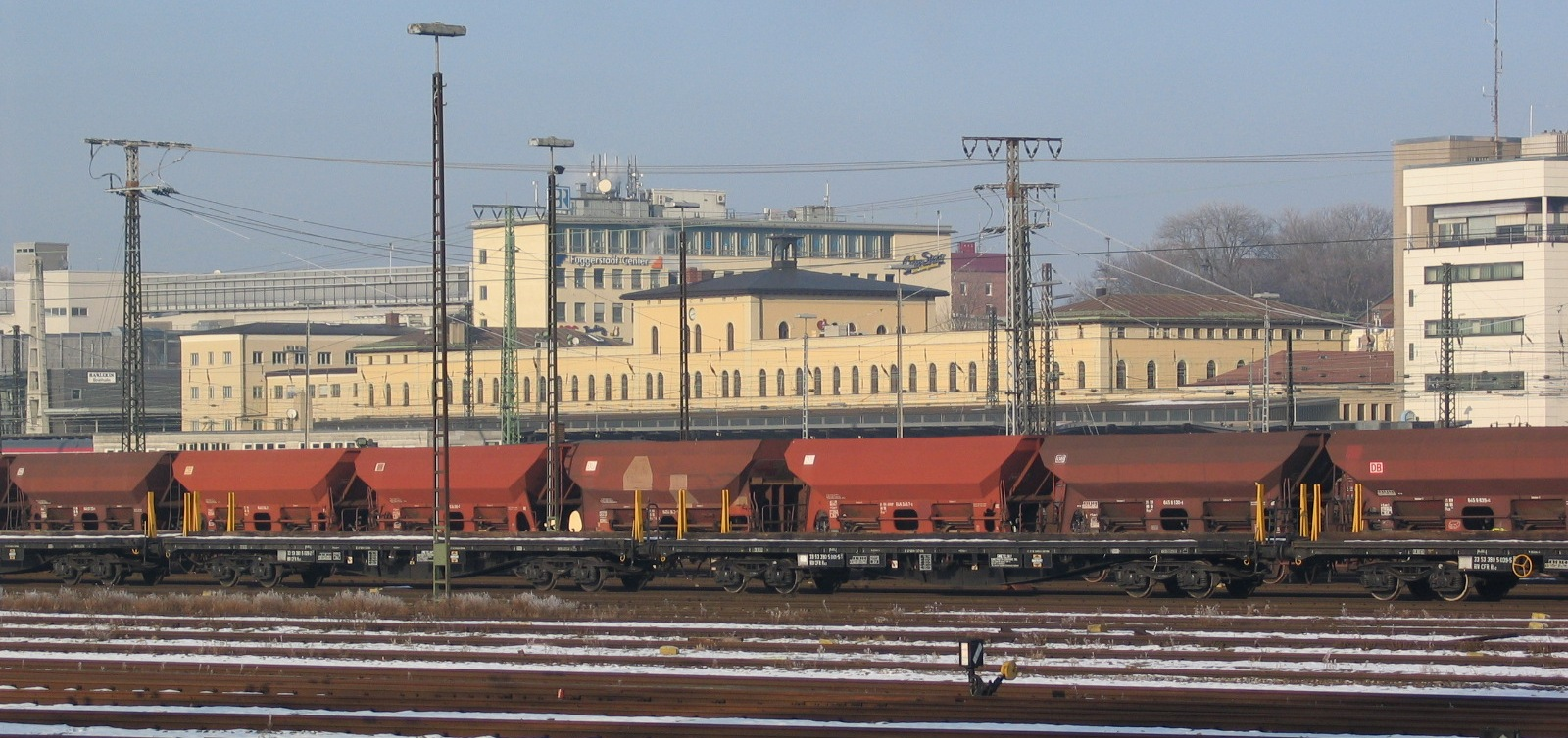 Augsburg, Hauptbahnhof, Westseite